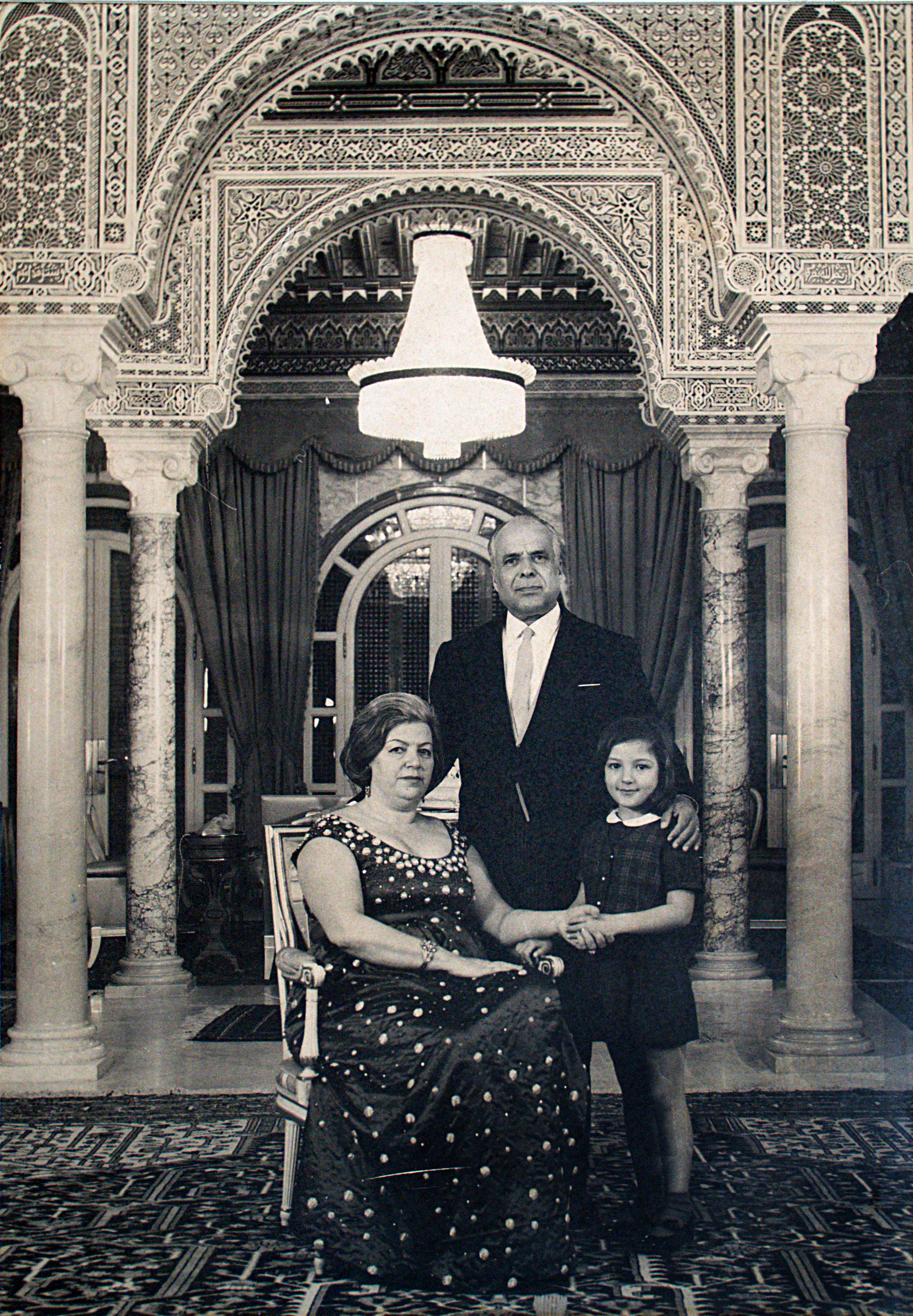 Photo de Habib Bourguiba, son épouse Wassila et leur fille adoptive Hajer au le palais de Carthage. Photo exposée au 2e étage du musée de Bourguiba à Monastir dans la suite de Hajer Bourguiba.